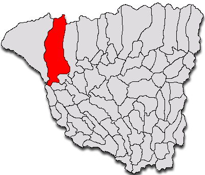 Categorie:Hărţi ale judeţului Gorj